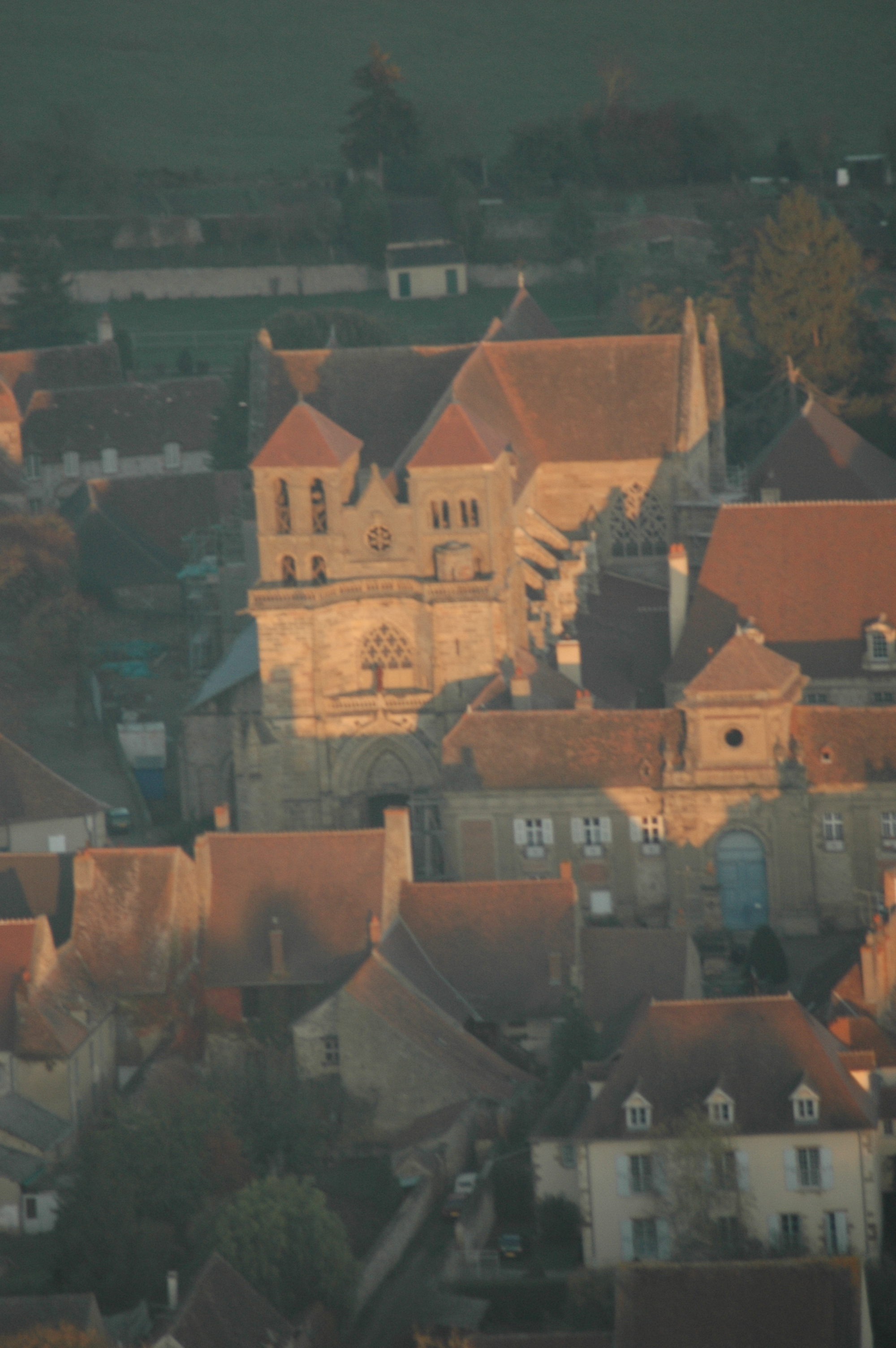 Vue aérienne sur l'église de Souvigny